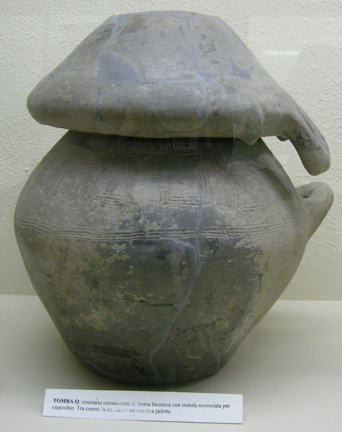 Museo guarnacci, urne cinerarie villanoviane